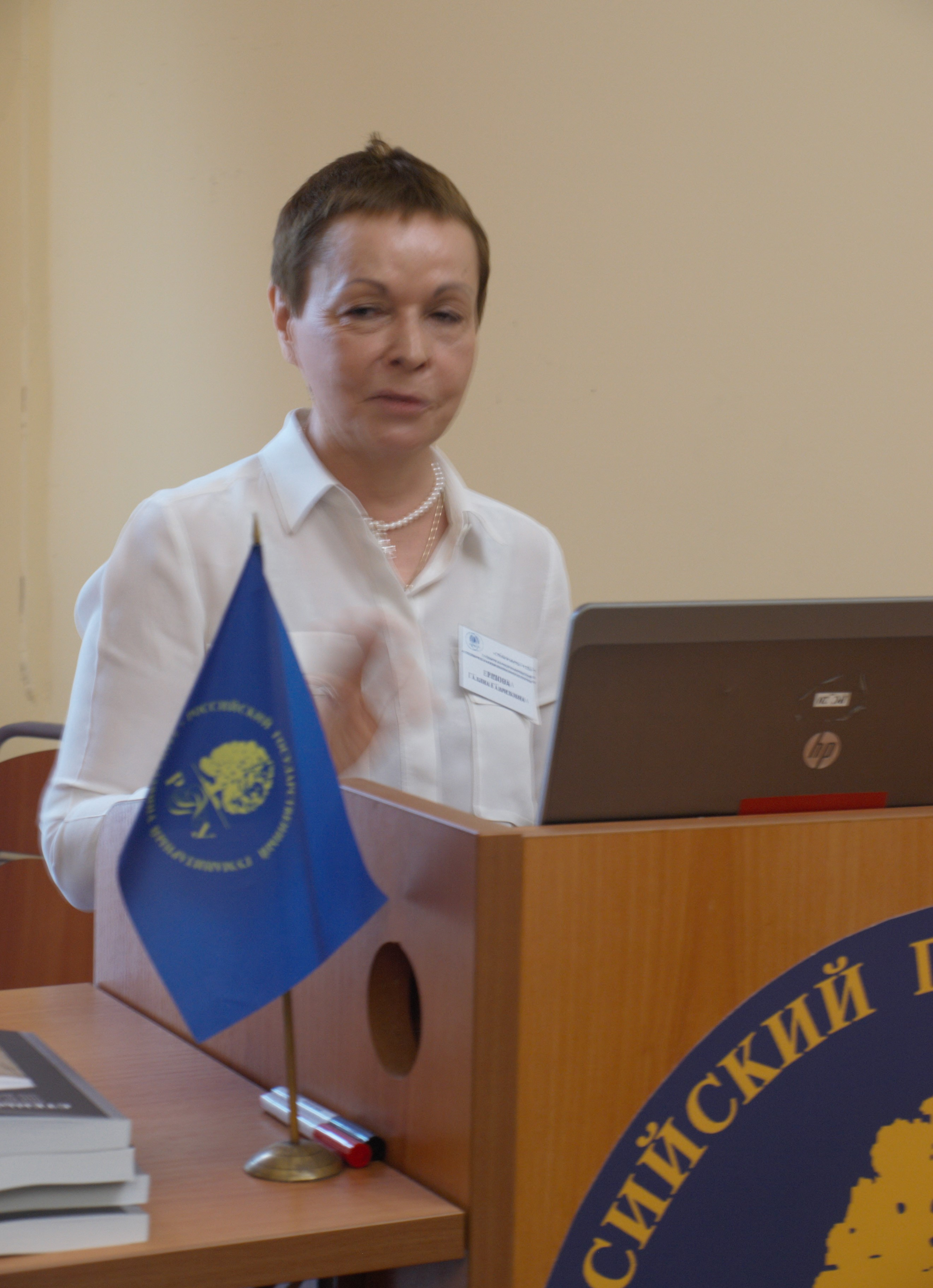 Фото с открытия конференции "Стены и мосты" в РГГУ. 23.05.2019